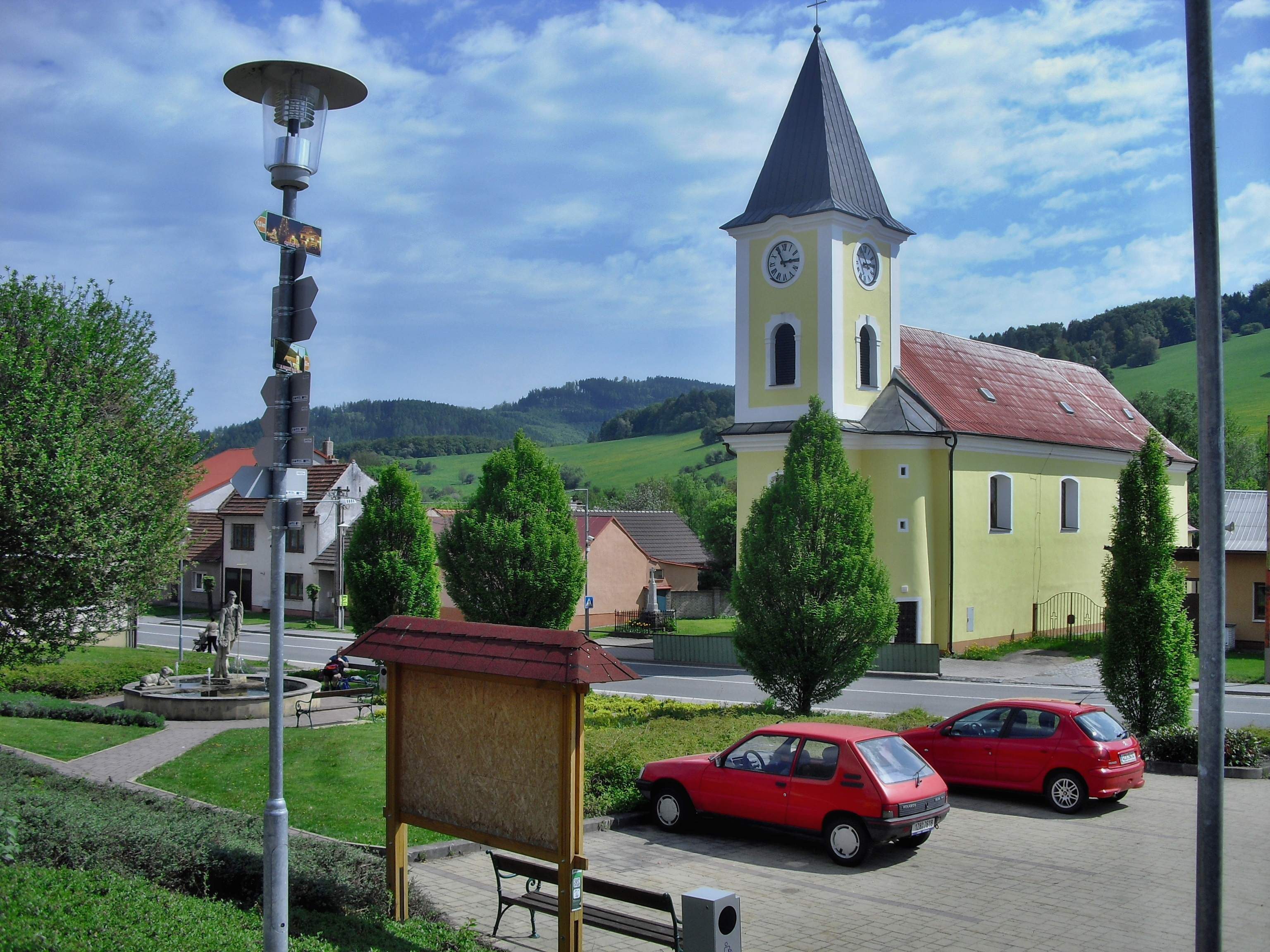 Starý Hrozenkov